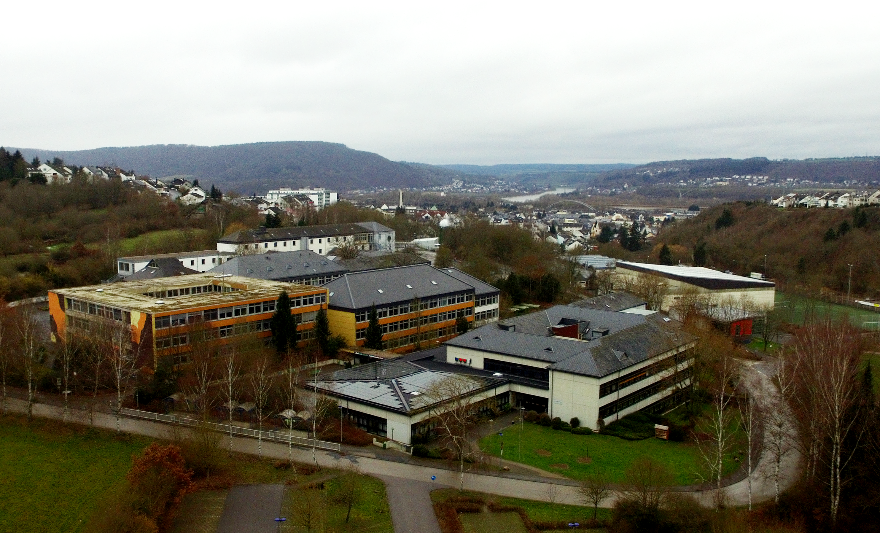 Schulzentrum Konz Zustand Februar 2016 . Die Gebäude wurden von rechts vorne nach links hinten für Gymnasium, Hauptschule und Realschule gebaut. Heute wird das Hauptschulgebäude von der Realschule plus und dem Gymnasium genutzt und wohl bald abgerissen.